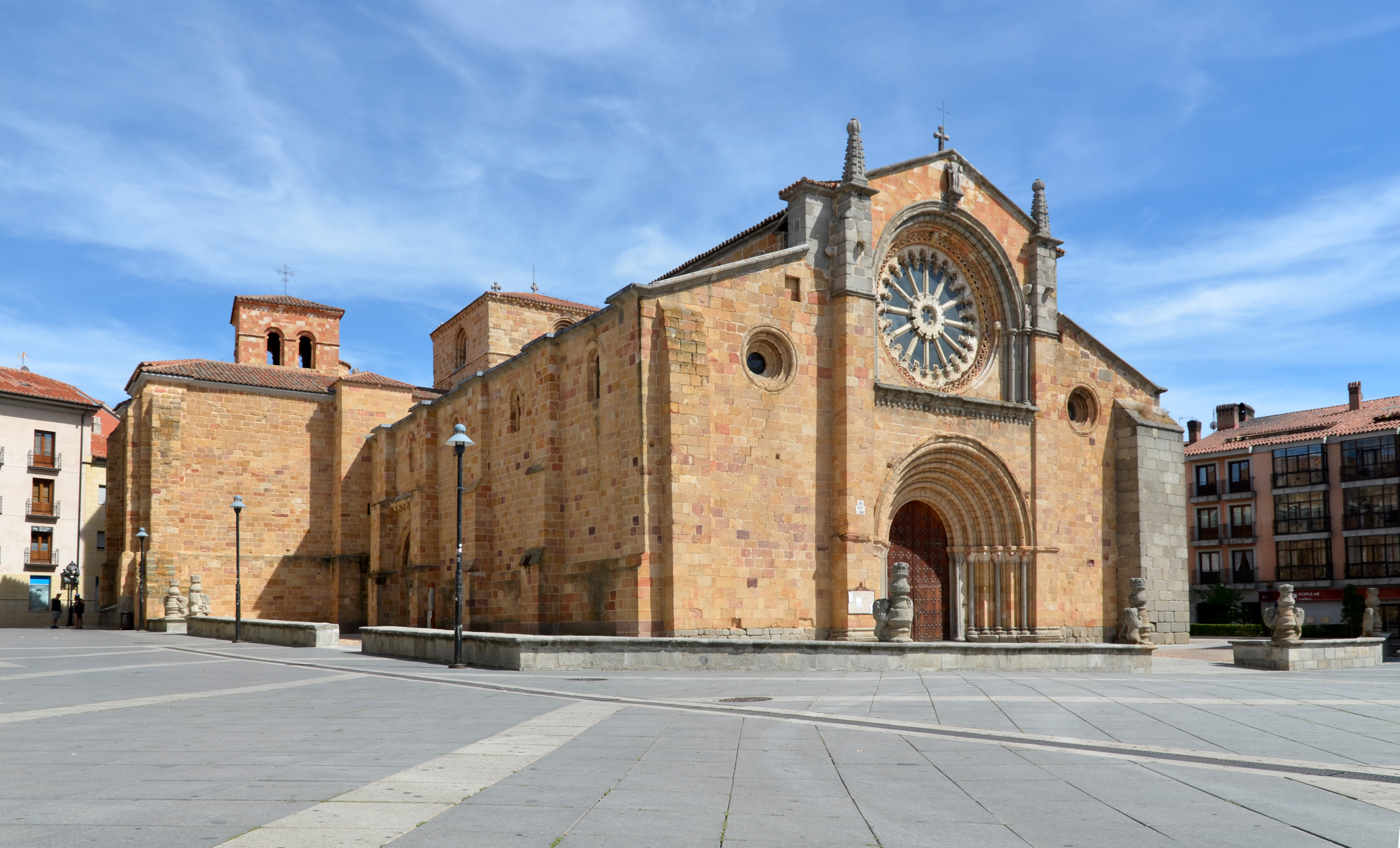 Iglesia de San Pedro - Avila